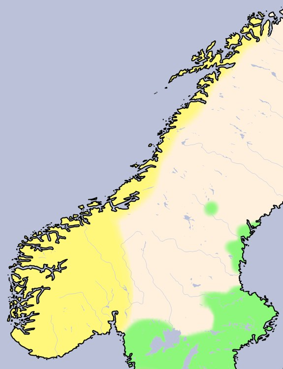 Norwegen im Zeitalter der Wikinger, unbeschriftet